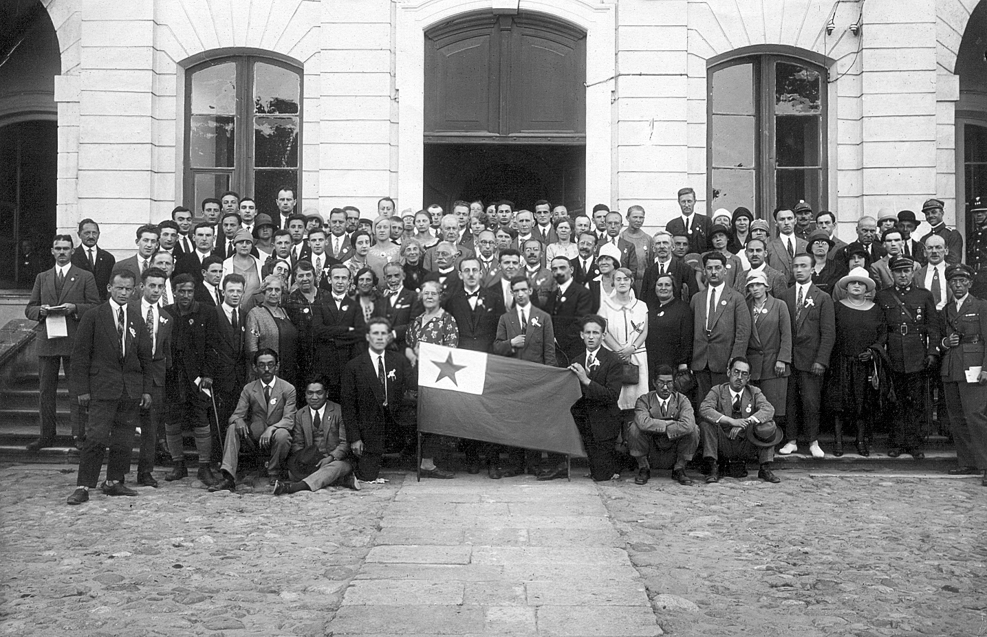 Internationaler Esperanto-Nachkongress, Białystok 1927. Gruppenfoto der Teilnehmer. Abgebildet u.a.: Feliks Zamenhof, Lidia Zamenhof, Pál Balkányi, Helmi Dresen und Teo Jung